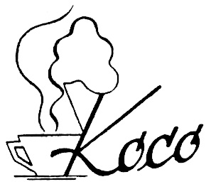 Advertentie met de beste nieuwjaarswensen voor het nieuwe Joodse jaar door ijssalon Koco in het Nieuw Israelietisch weekblad van 13 september 1939. IJssalon Koco werd later middelpunt van de razzia in Amsterdam en Februaristaking.